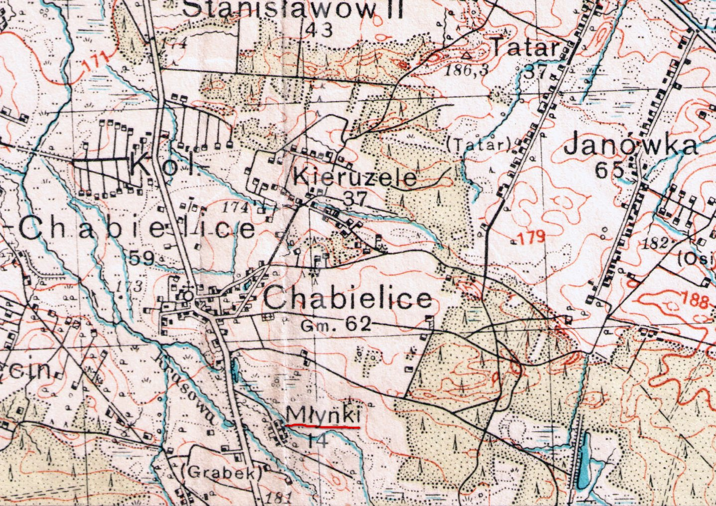 Młynki fragment wojskowej mapy ,,Szczerców